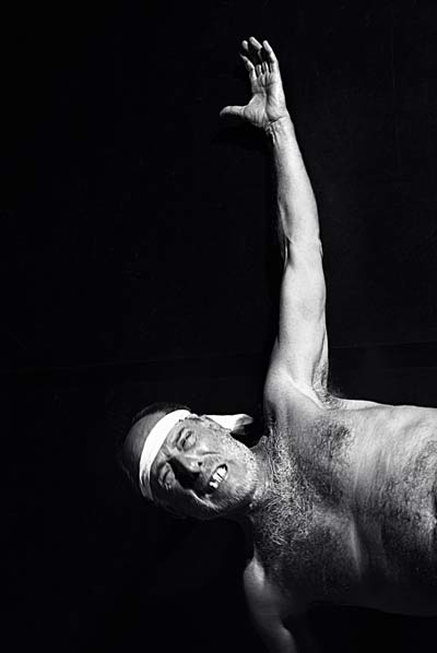 Foto de Fermí Reixach en el papel de Poprixin de "Diari d'un boig. Bicentenari de Nikolai Gógol", 2009-2010.